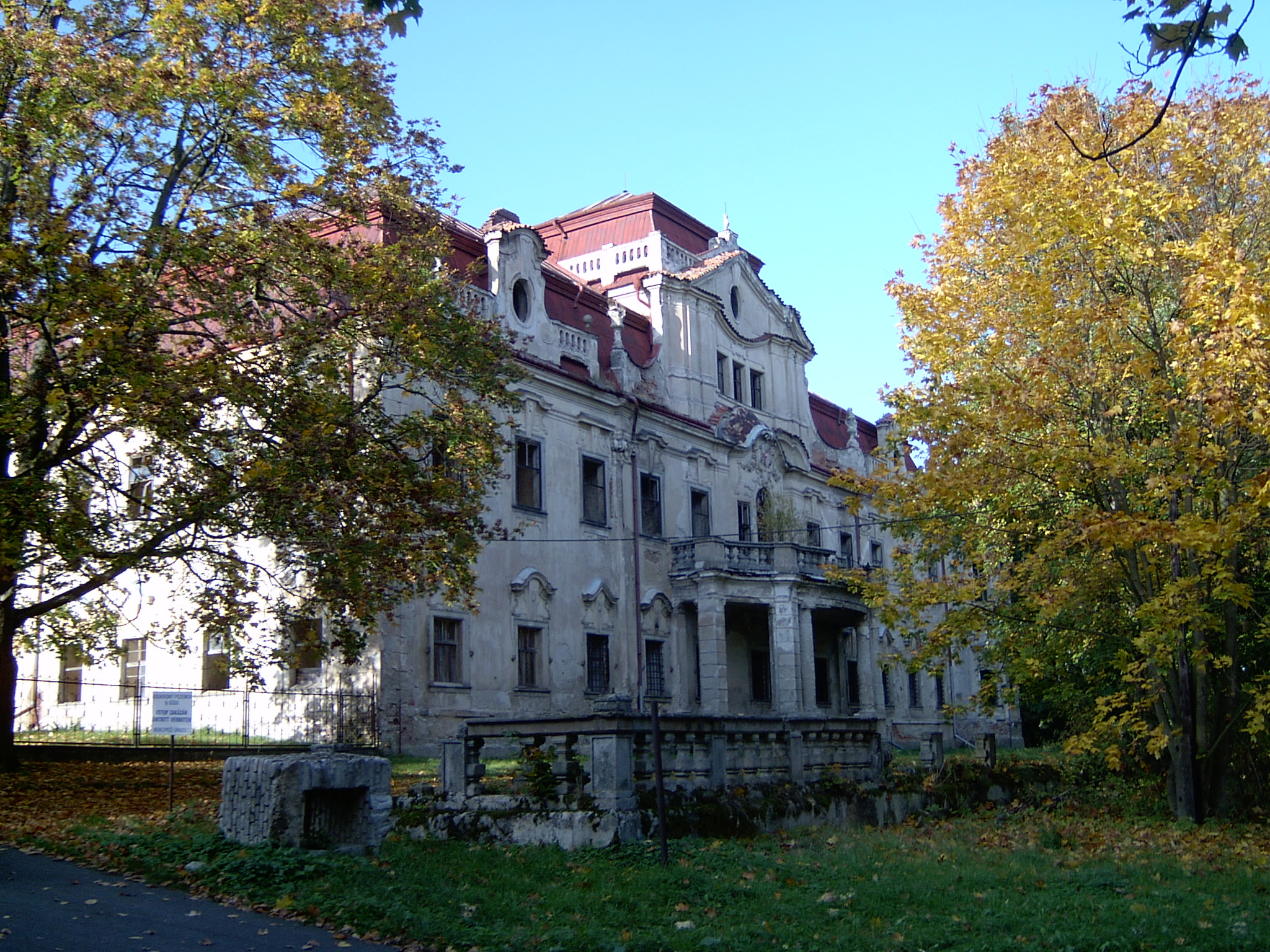 Zámek Velké Dvorce u Rozvadova